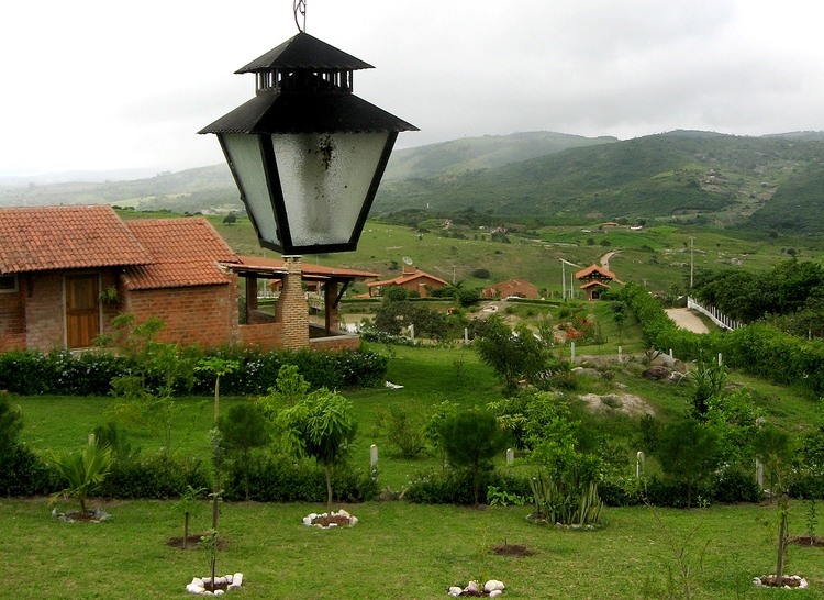 Gravatá - Pernambuco - Brasil